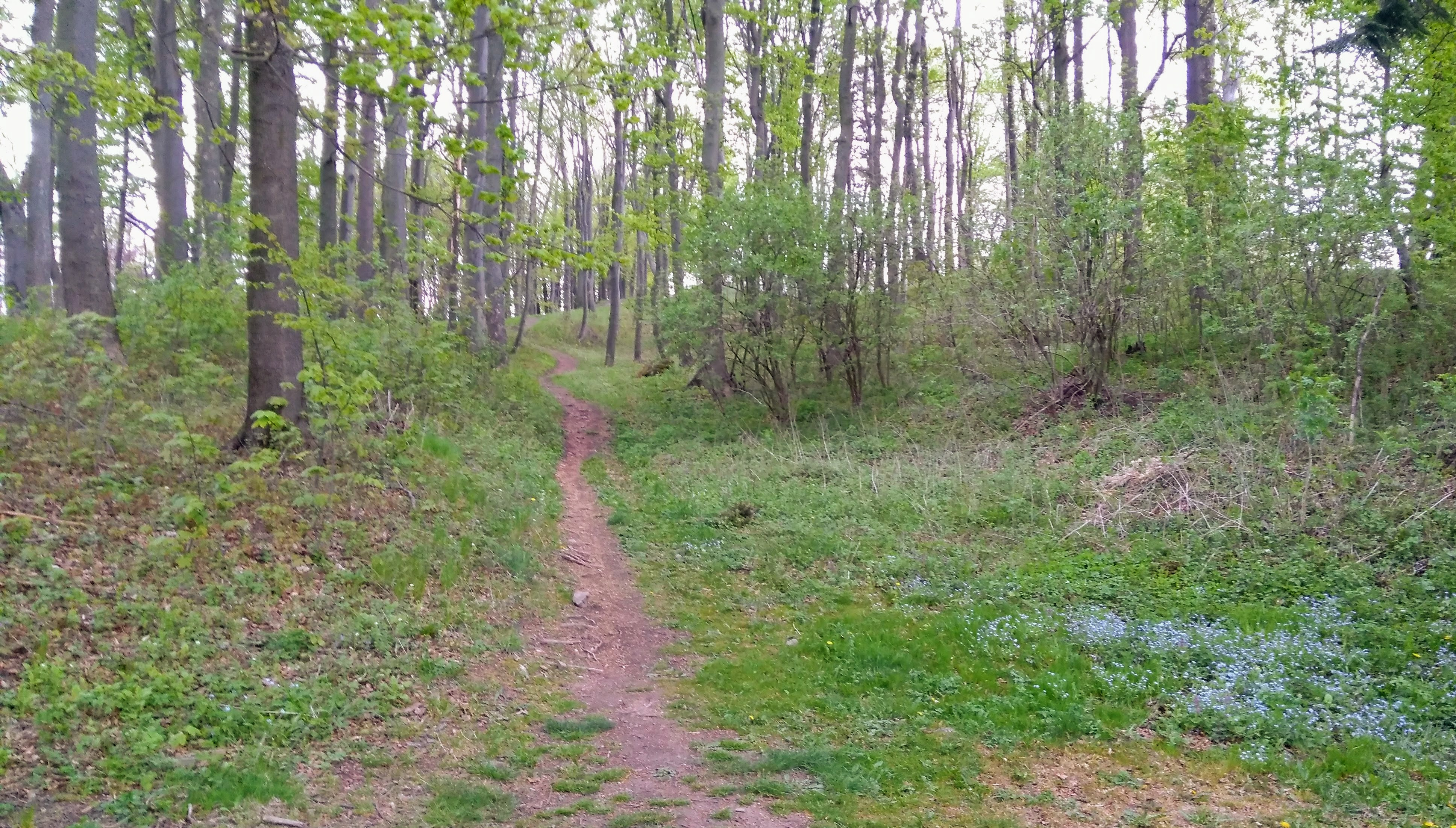 Val rozsáhlého pravěkého hradiště se zbytky příkopu na západní straně vrcholu hory Hostýn Hradiště, Hostýn, Chvalčov.